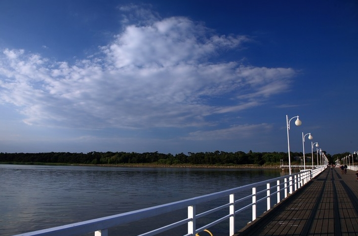 Jurata